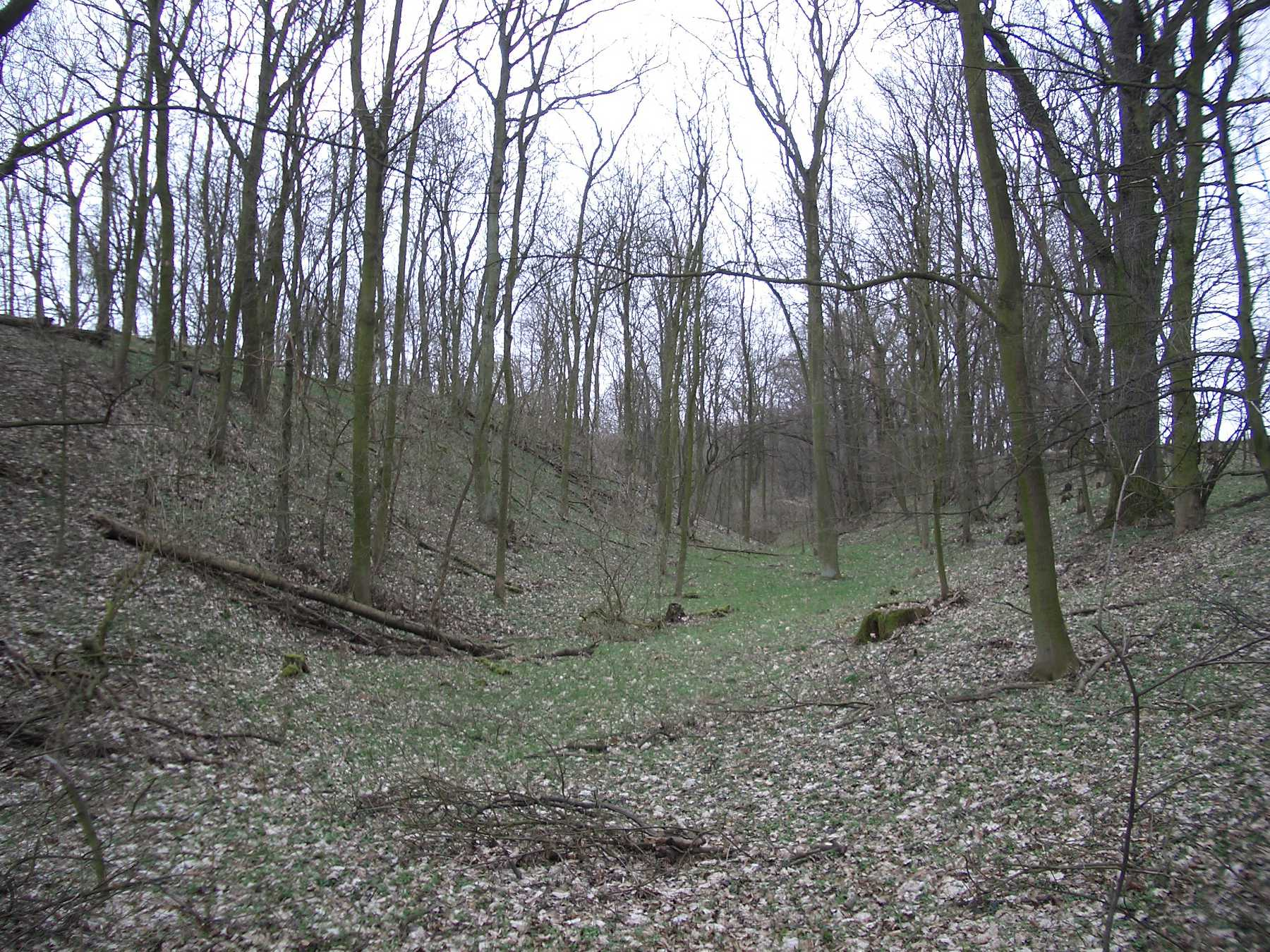 Reitweiner Wallberge: Wallberg auf dem Reitweiner Sporn, Brandenburg